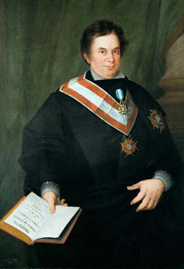 Retrato del jurista español Pedro Sainz de Andino (1786-1863), fiscal y miembro del Consejo de Hacienda de España y de la Cámara de Castilla desde 1829, siendo además el responsable jurídico de la creación de la Bolsa de Madrid en 1834. Trabajó además en la preparación del Reglamento del Banco Español de San Fernando y del Código de Comercio, ambos en 1829, trabajo que completó con la Ley de Enjuiciamiento Comercial de 1830. Fue miembro de la Real Academia de la Historia.